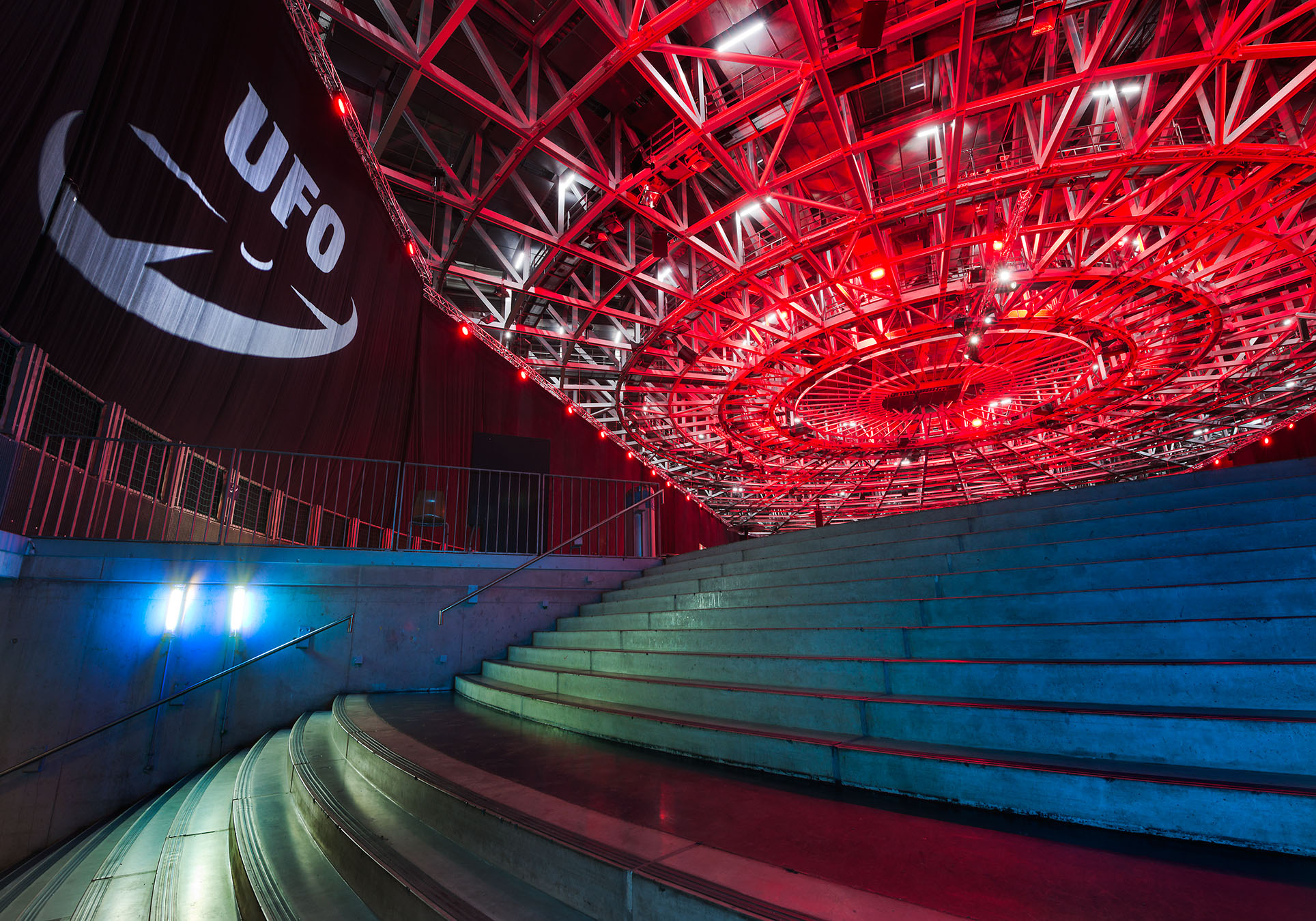 So sieht das UFO im Velodrom aus.